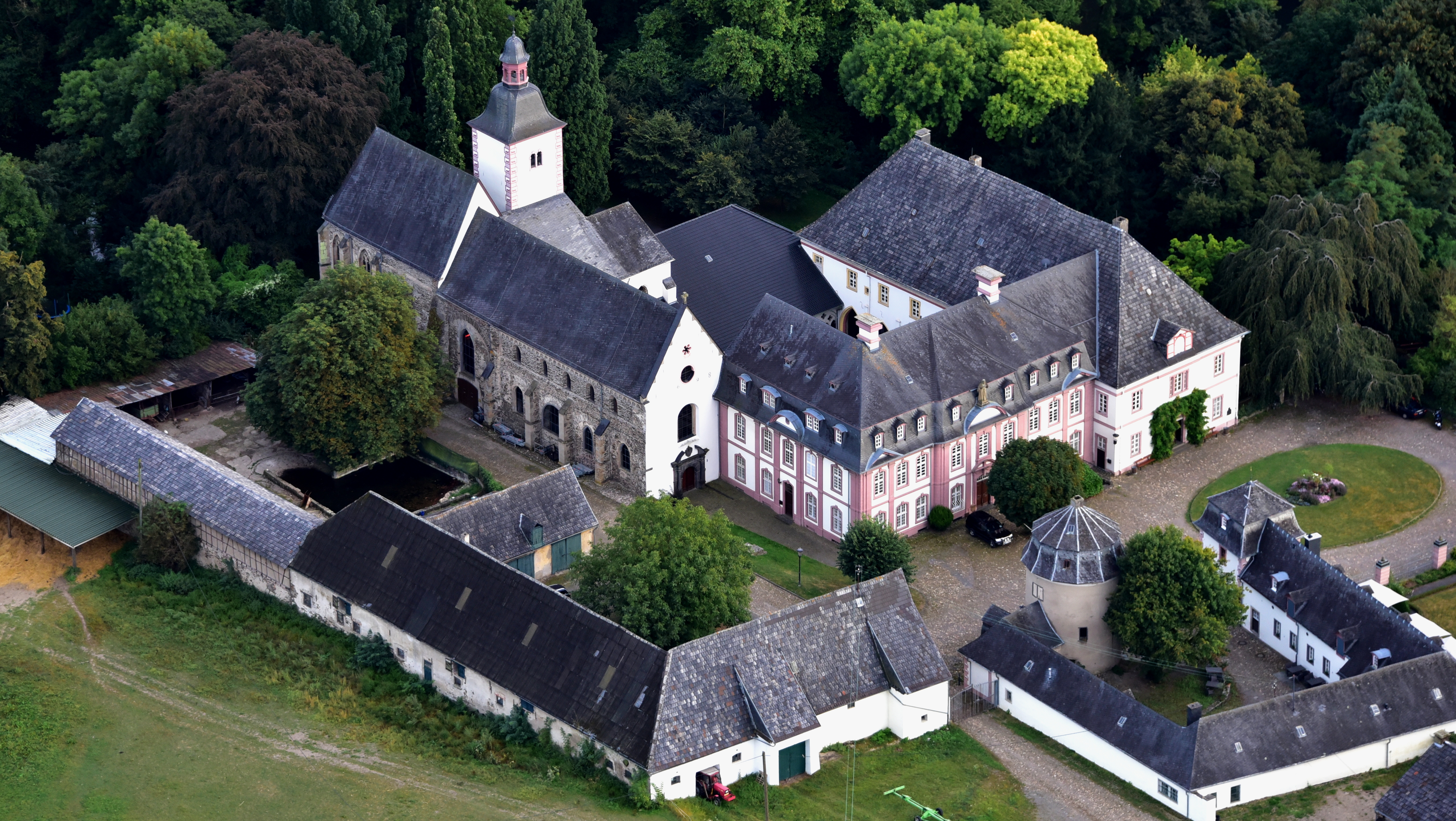 Abtei Rommersdorf, Luftaufnahme (2016)